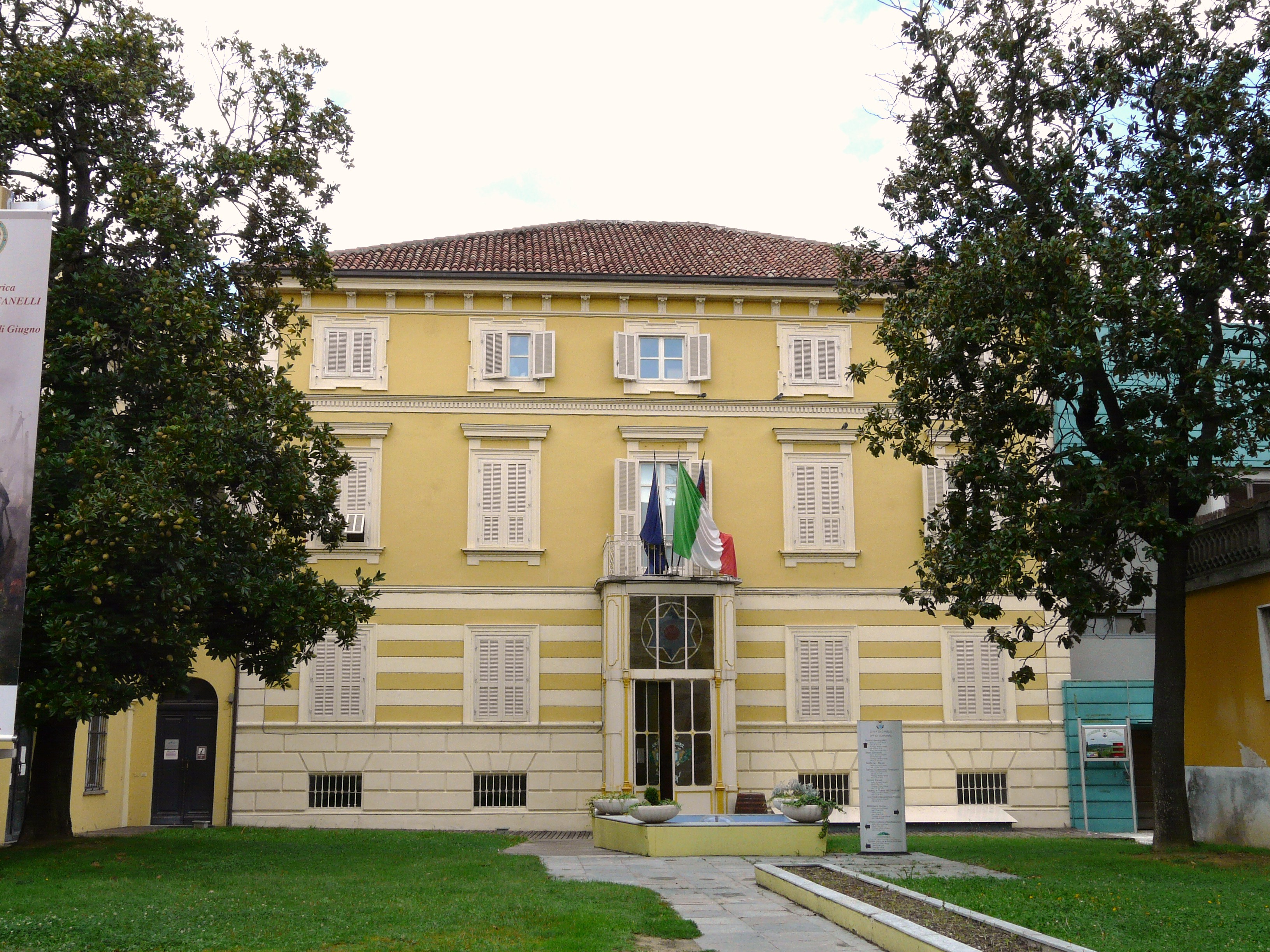 Municipio di Canelli, Piemonte, Italia